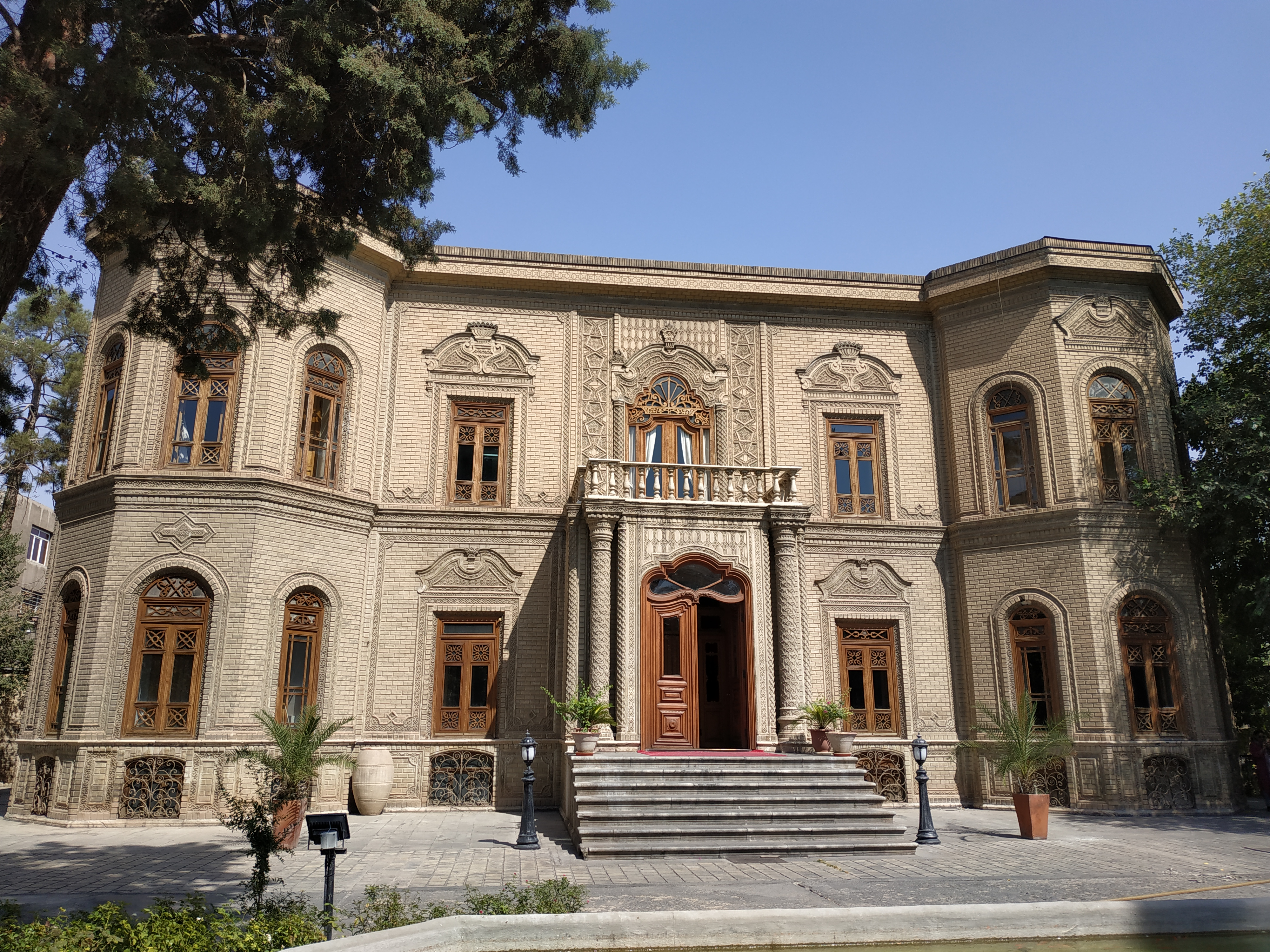 موزه آبگینه و سفالینه